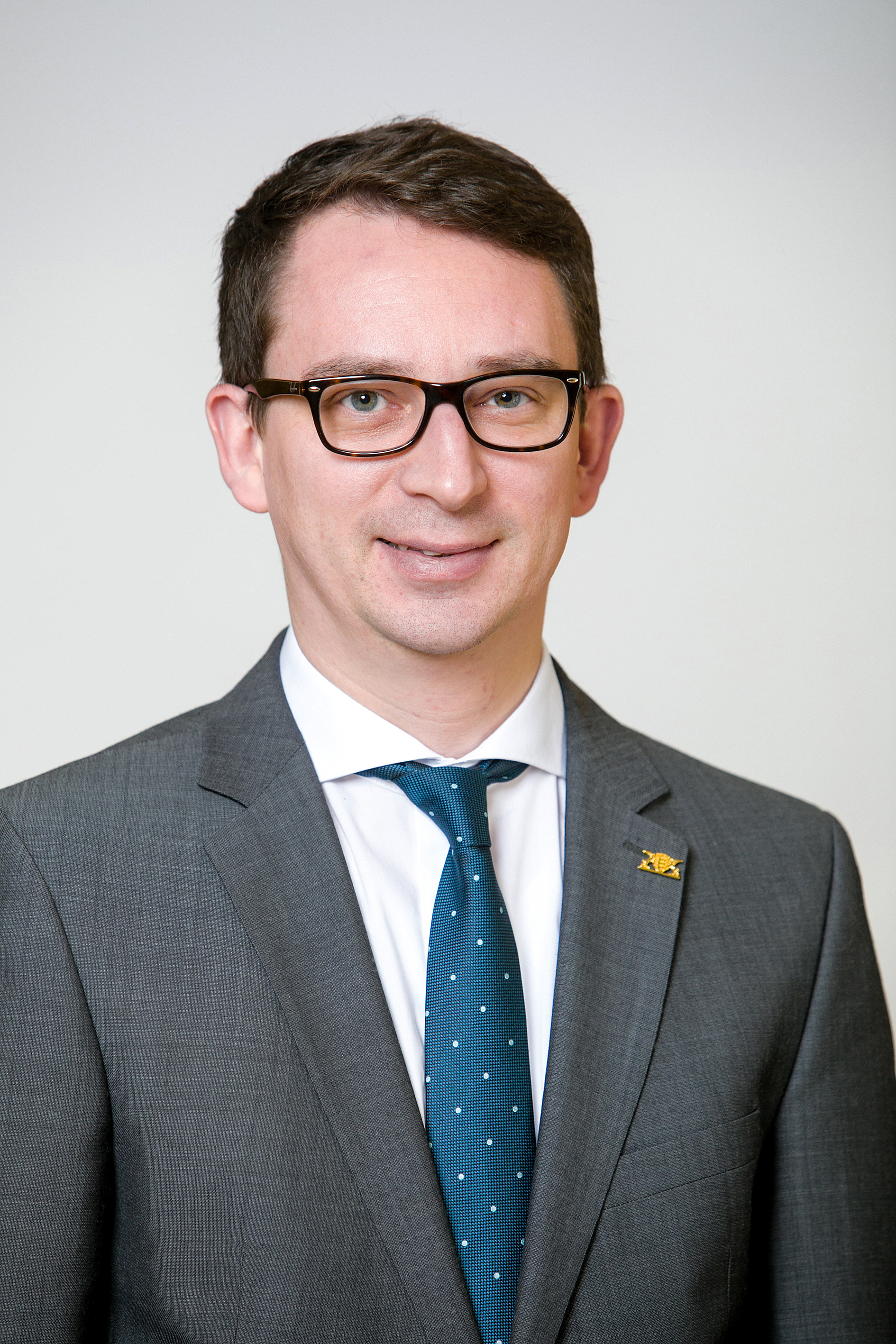 Jonas Weber SPD Landtagsabgeordneter BW